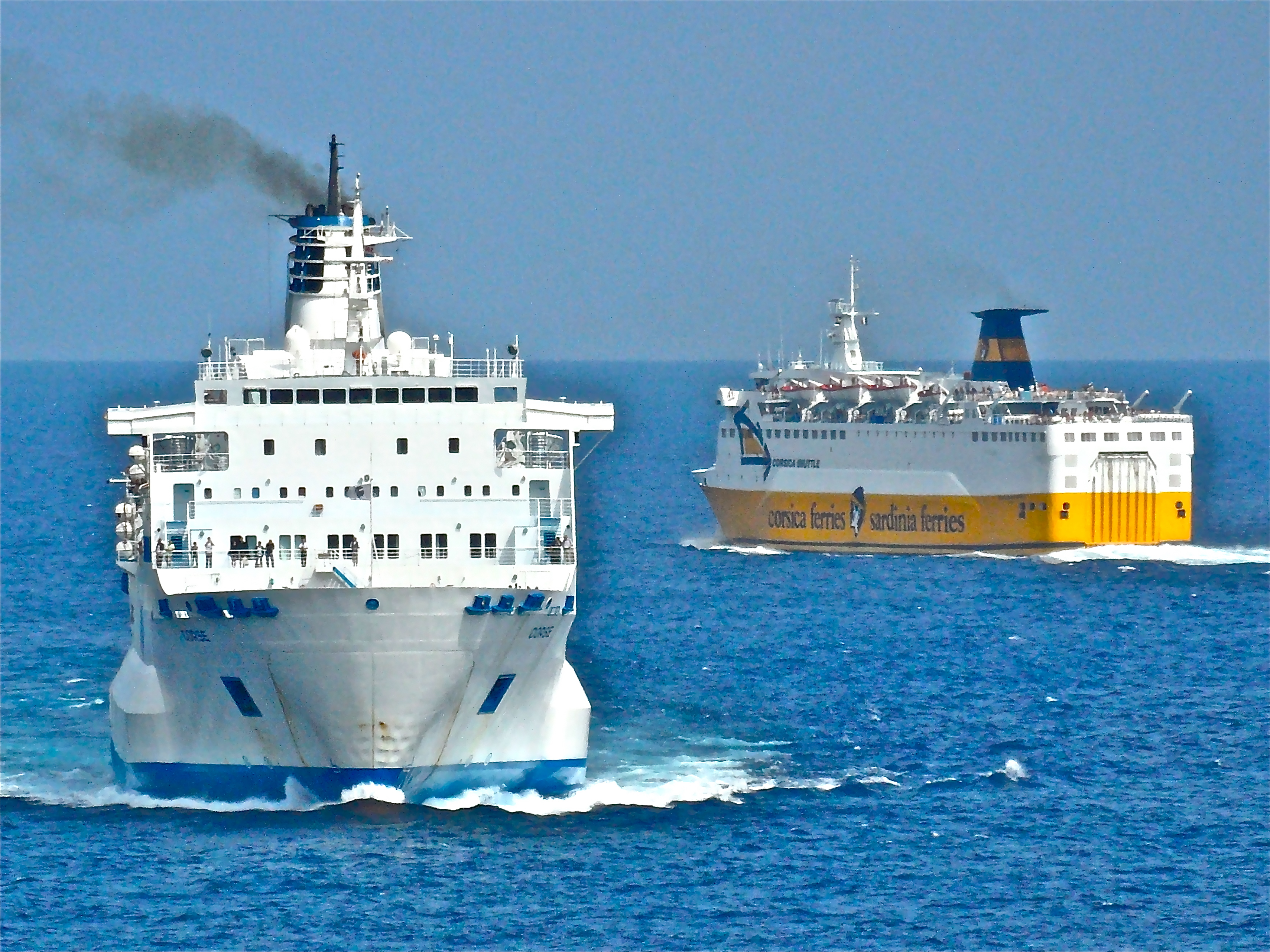 le Corse (SNCM) et le Corsica Marina Seconda (Corsica Ferries) devant Bastia.